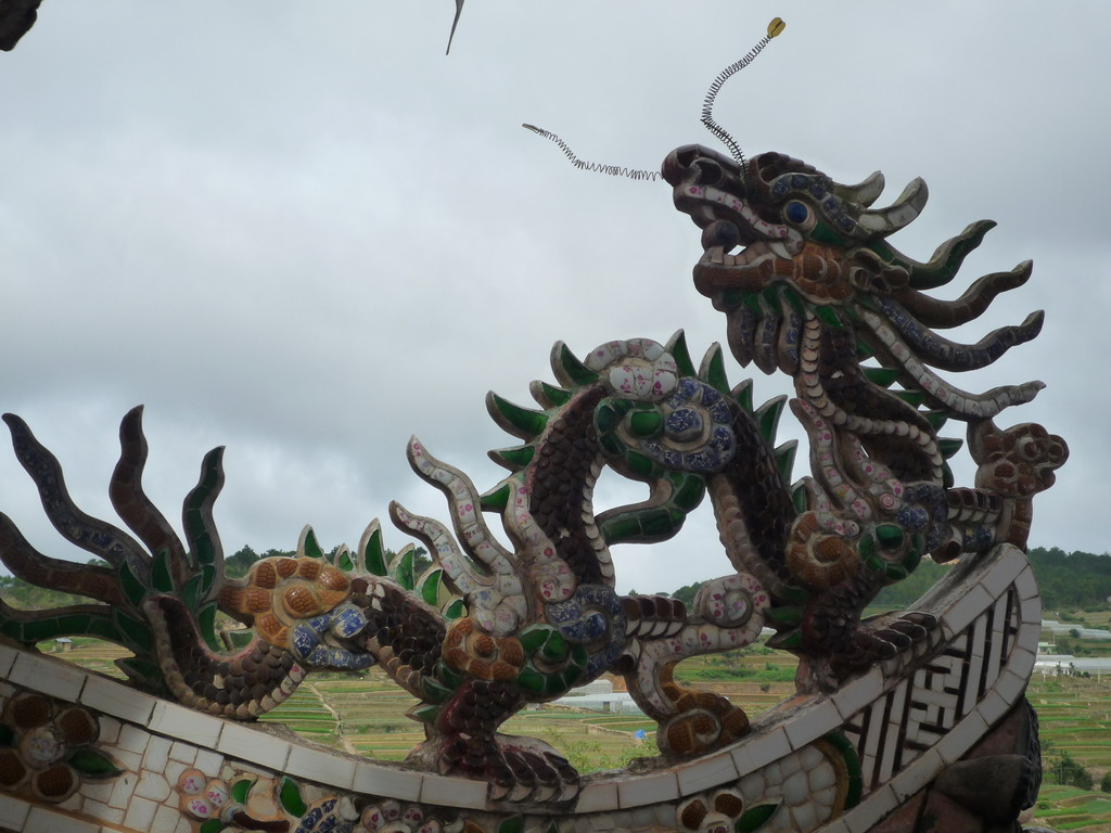 Chùa Linh Phước.